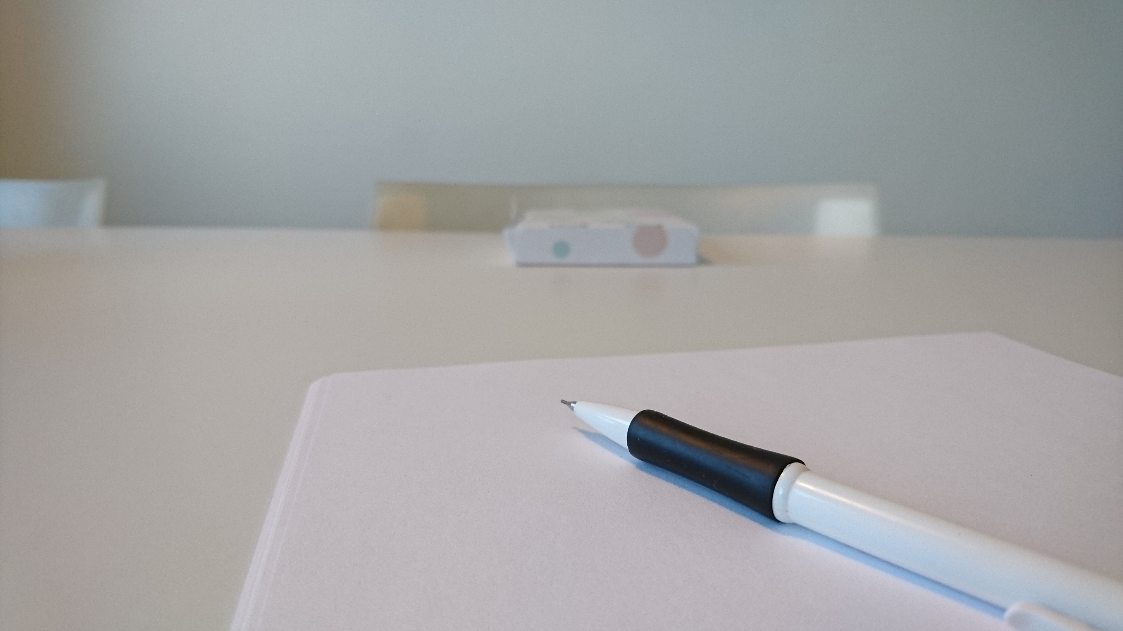 Arrangerad bild.